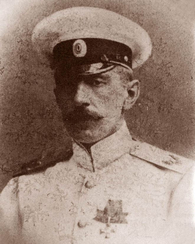 Адмирал Михаил Павлович Саблин, ком. Черноморским флотом в 1917-1918 гг.